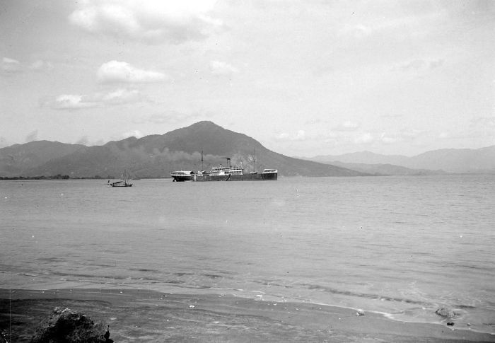 Negatief. S.S. Van Heemskerk van de KPM in de Taliwang-baai